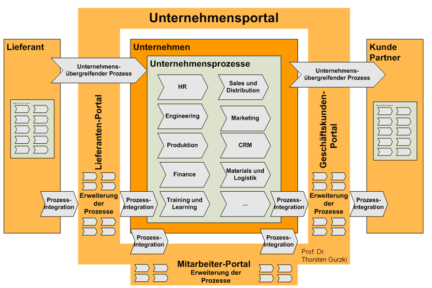 Unternehmensportale im betrieblichen Umfeld. Unternehmensportale abstrahieren die Kernprozesse eines Unternehmens (Mitarbeiterportal, Kundenportal, Lieferantenportal), generelles Umfeld eines Portals.